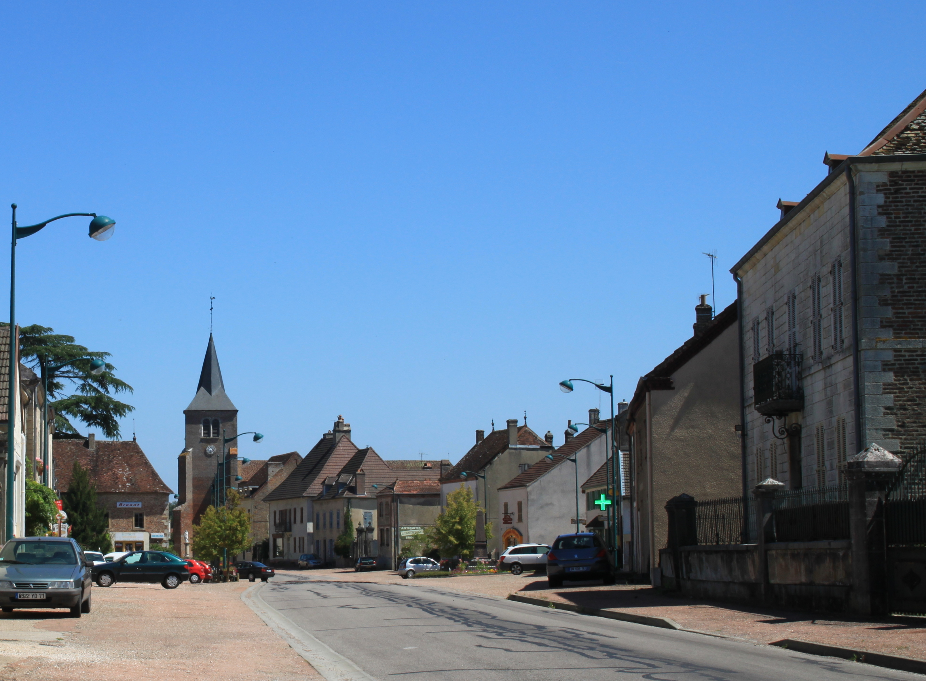 Bellevesvre Hauptstrasse Richtung Osten